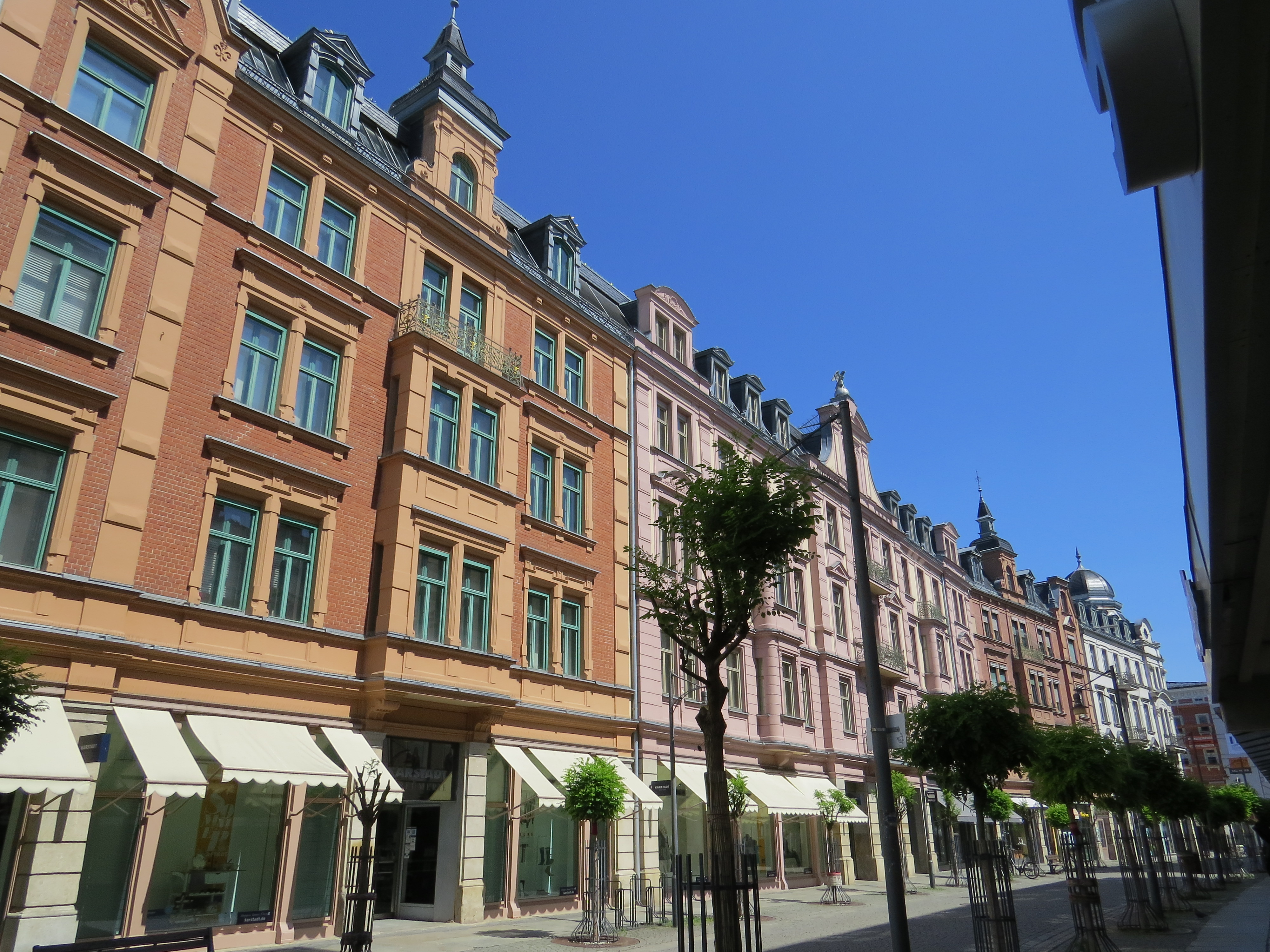 Gillitzerblock Münchener Str. 8 - 4 in Rosenheim